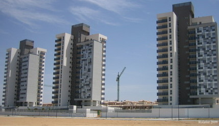 Las tres Torres de la Casería, el la Playa homónima